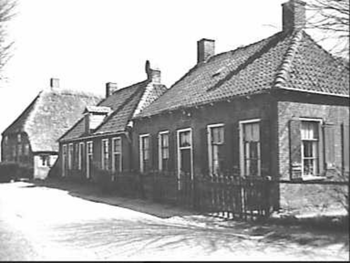 Zuidelijke randgemeente/ Boerderijen: voorgevel (opmerking: Deze afbeelding hebben wij helaas alleen in deze lage resolutie.)